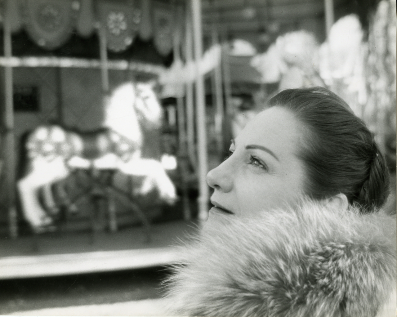 Servizio fotografico : Italia, 1954 / Paolo Monti. - Stampe: 3 : Positivo b/n, gelatina bromuro d'argento/ carta, 24x30. - ((Al verso di due stampe manoscritto: "Sarah ferrati, 1954", "Sarah Ferrati". Sul coperchio della scatola, manoscritto a pennarello: "Ritratti femminili"